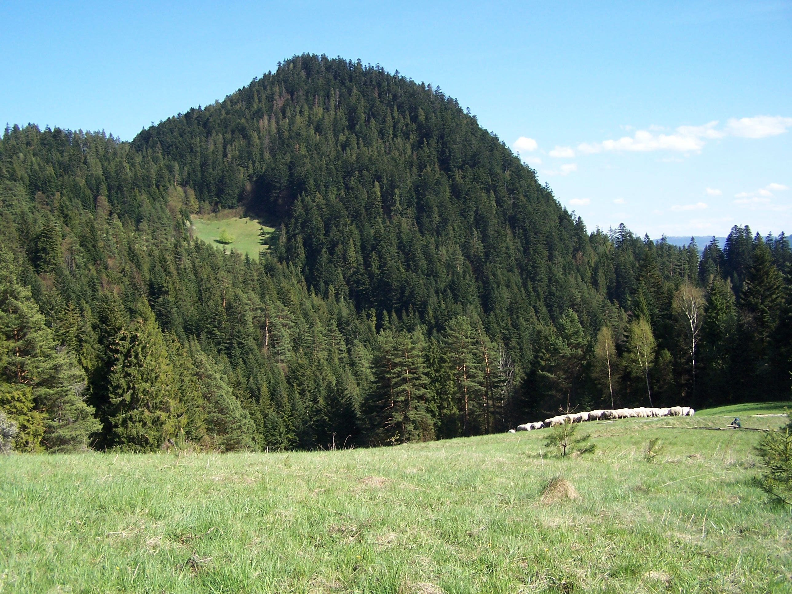 Macelowa Góra (Pieniny Właściwe)